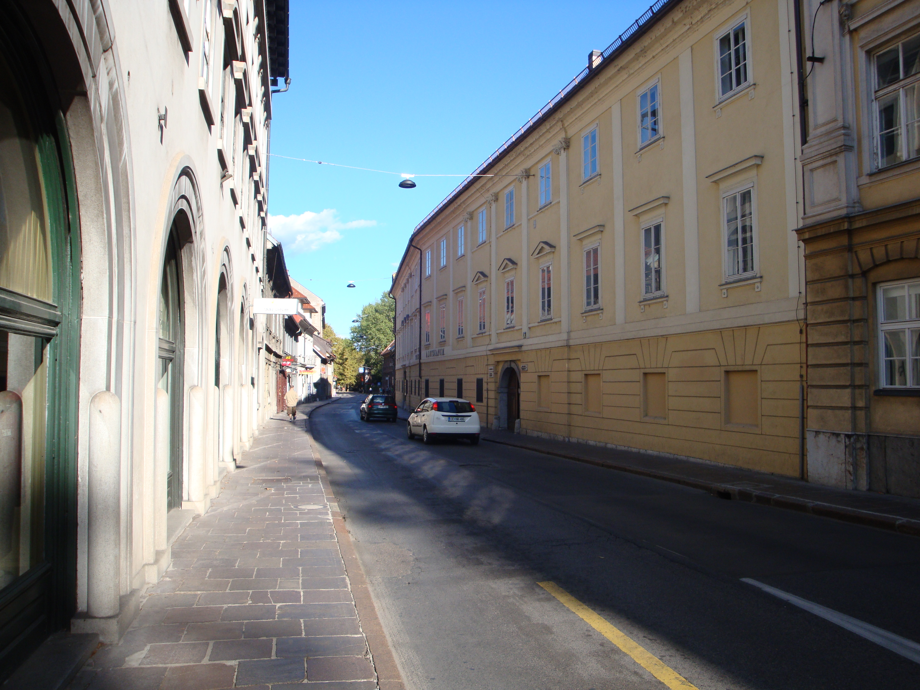 Poljanska cesta v Ljubljani. Stavba na desni je Teološka fakulteta Univerze v Ljubljani (Poljanska 4).